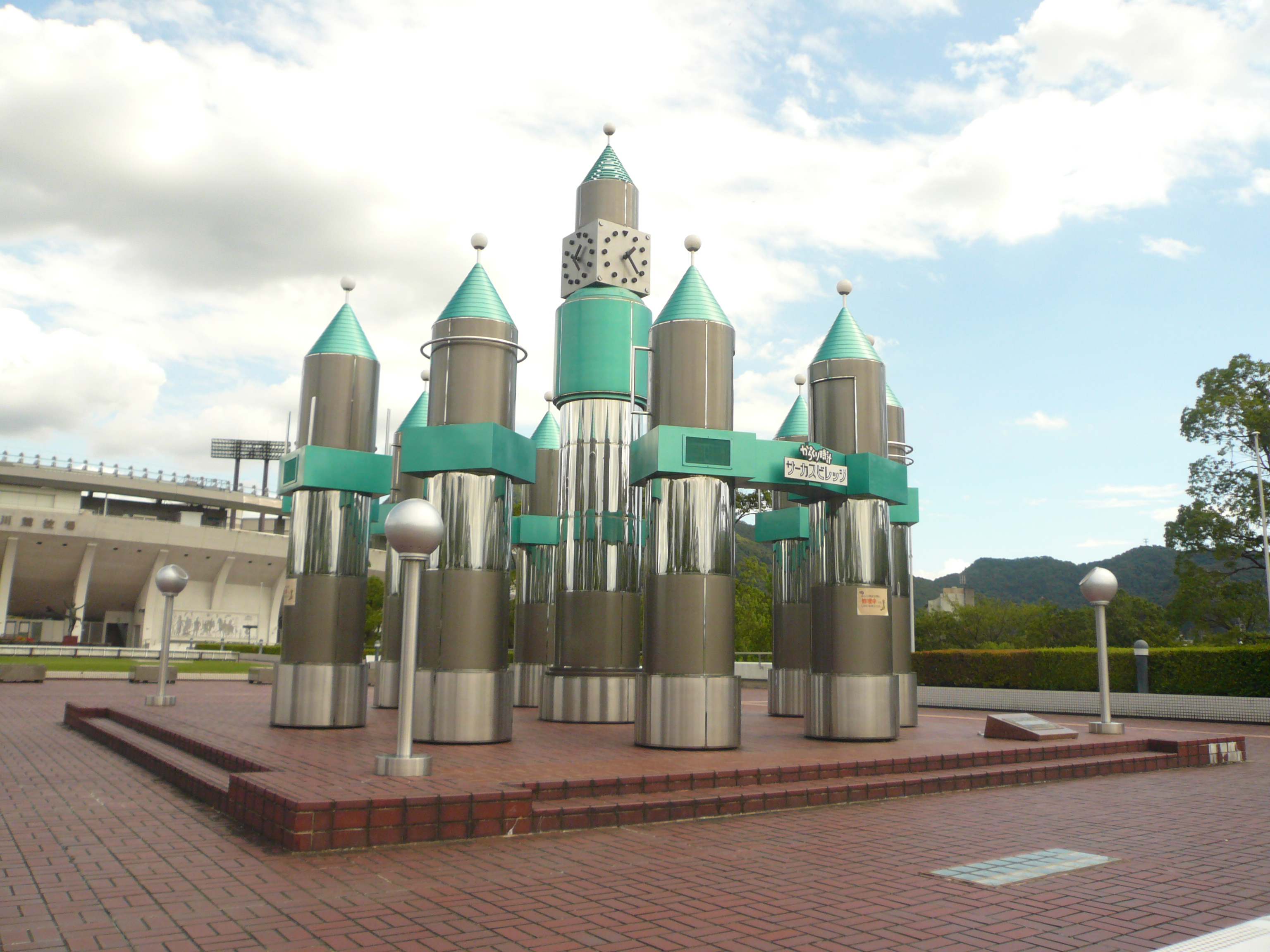 Gifu Memorial Center mechanism clock（岐阜メモリアルセンター）,Gifu,Gifu(岐阜県岐阜市)で撮影。サーカスビレッジ（からくり時計）